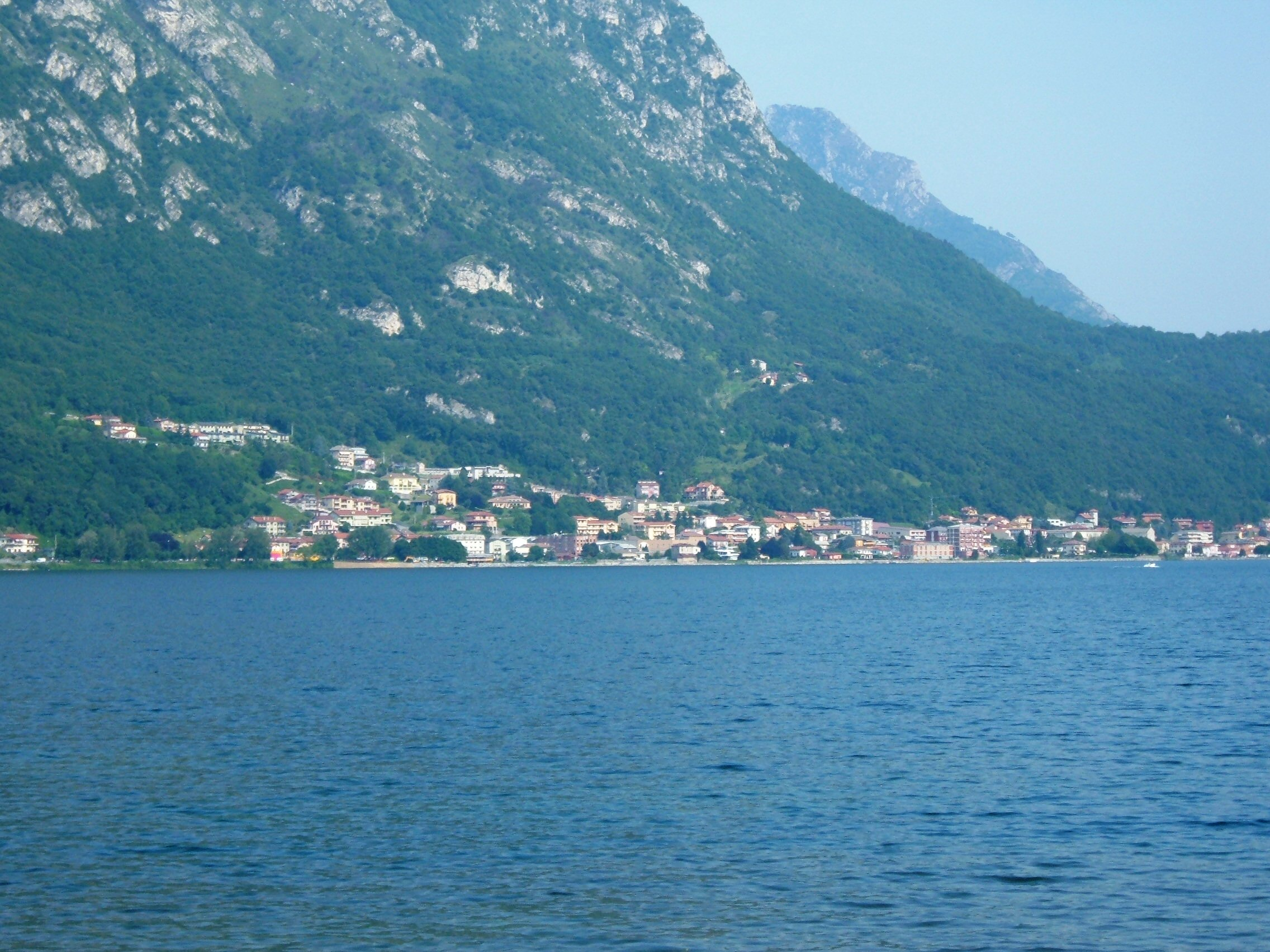 Vista di Pescate (prov. di Lecco) da Vercurago.